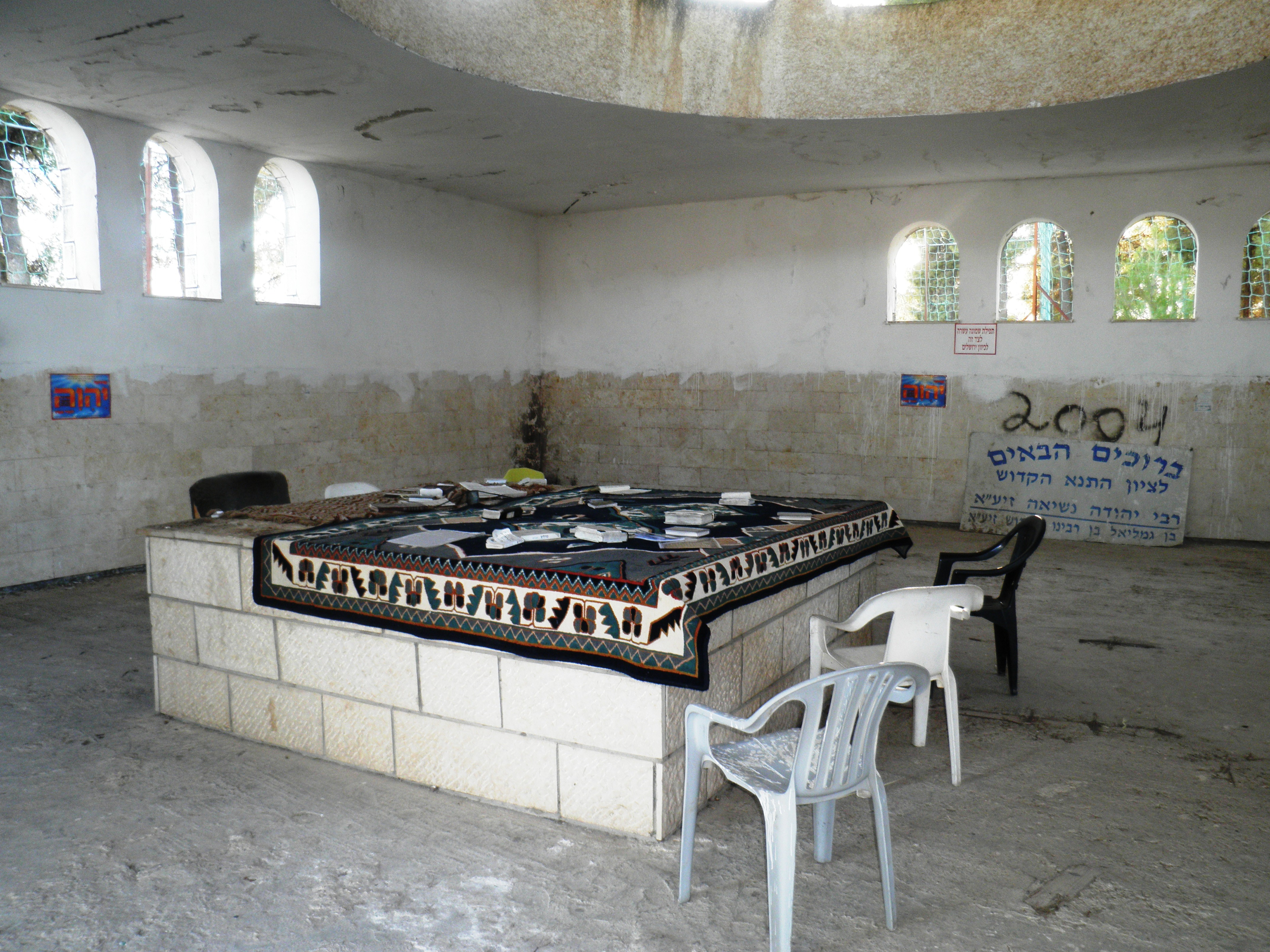 קבר יהודה נשיאה ובית דינו בהר יבנית